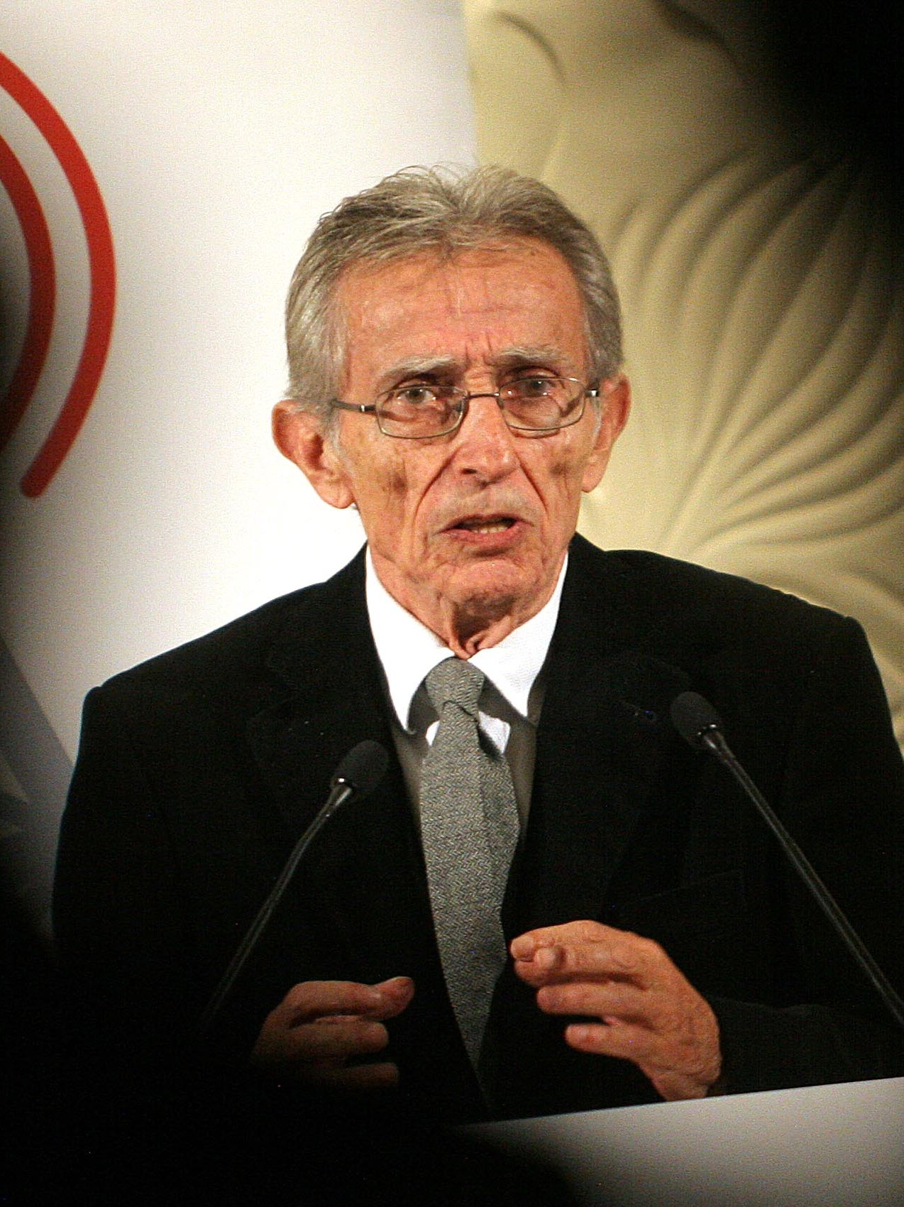 101013mp premi trias fargas d' assaig politic 2010 dins la nit del pensament que organitza fundacio catdem barcelona 13 10 2010 foto: Marta perez